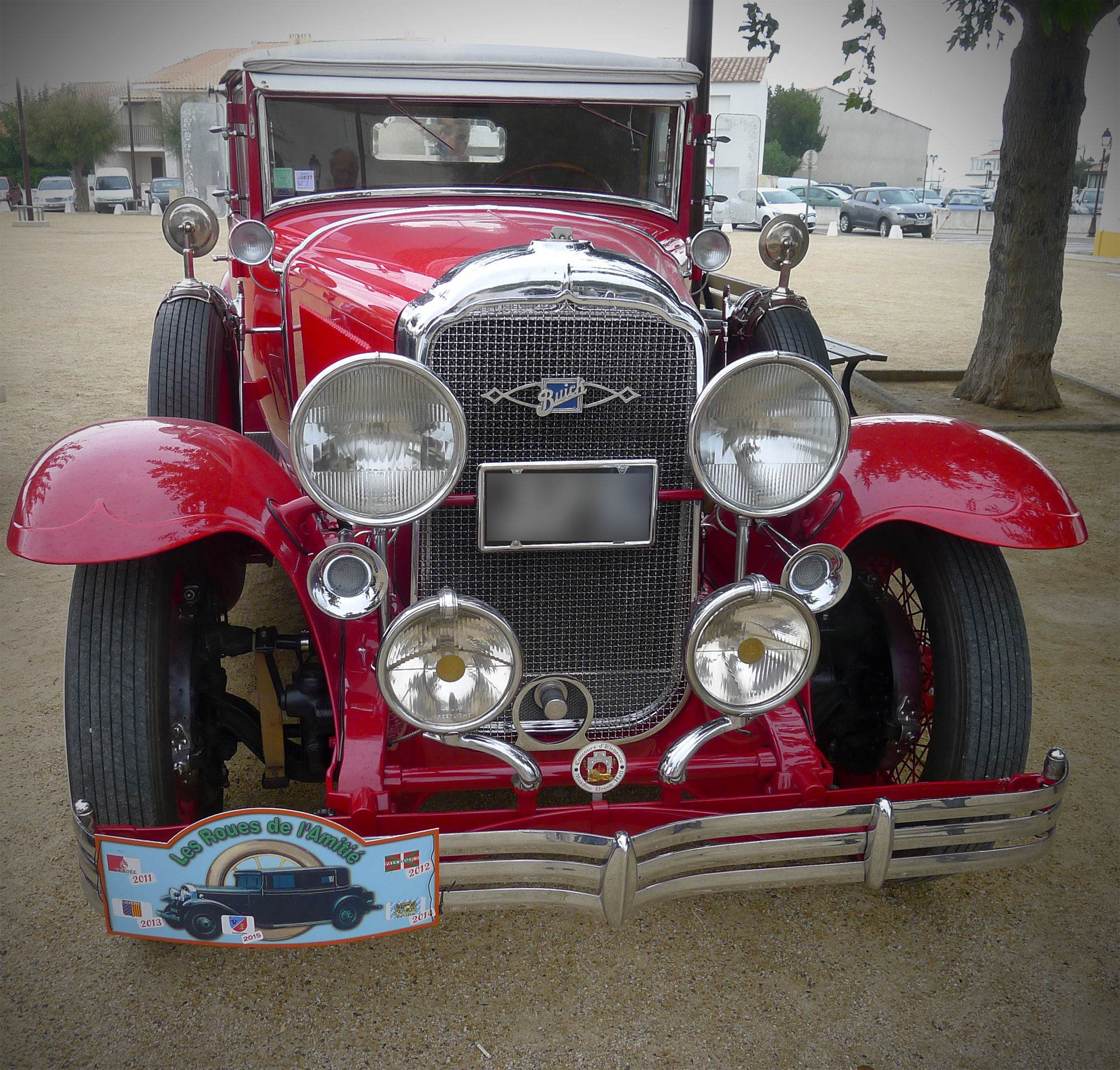 Buick (modèle xxxx)